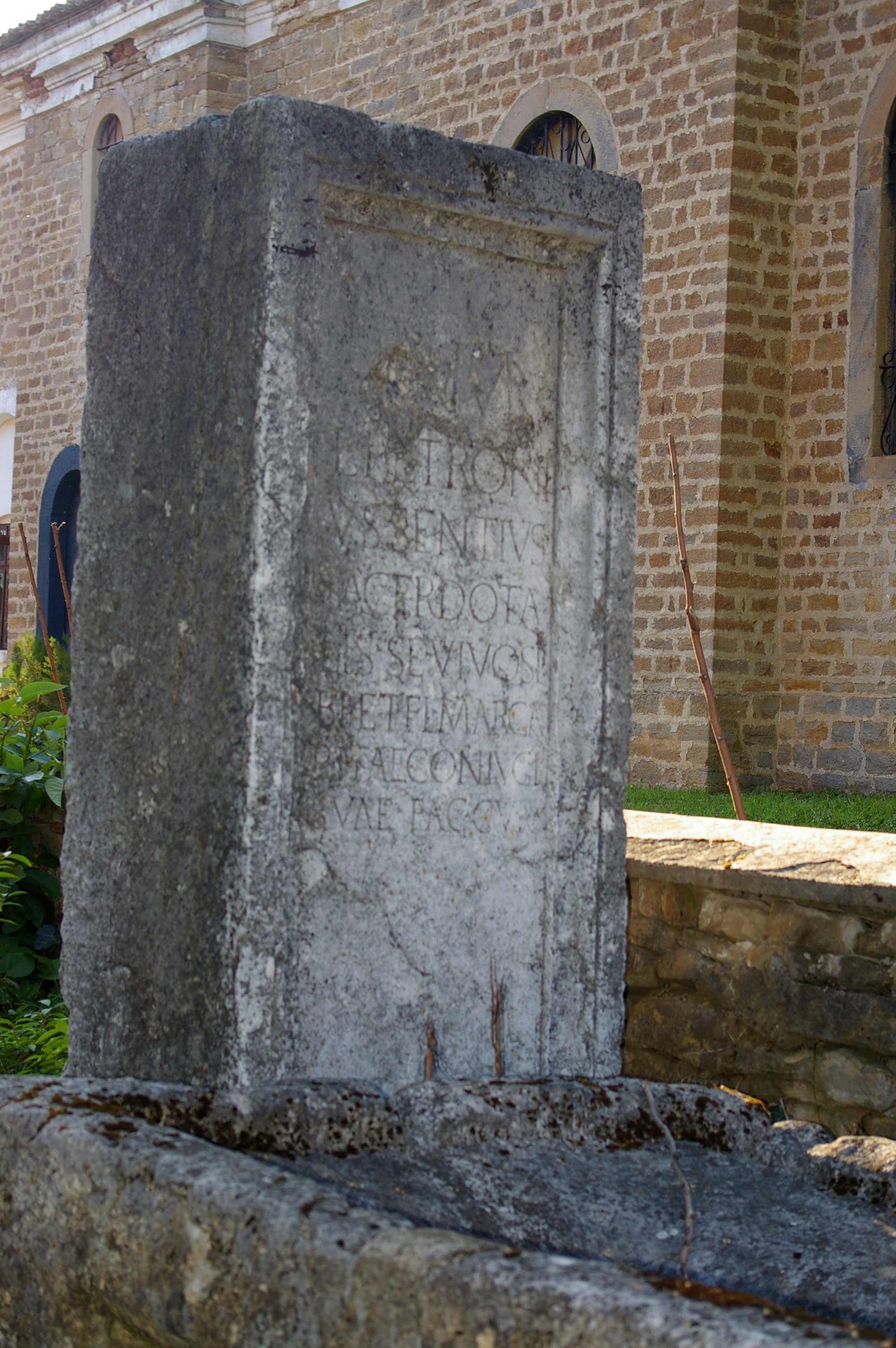 римска надгробна плоча местност Селище Вишовград снимка моя от 13 07 2013